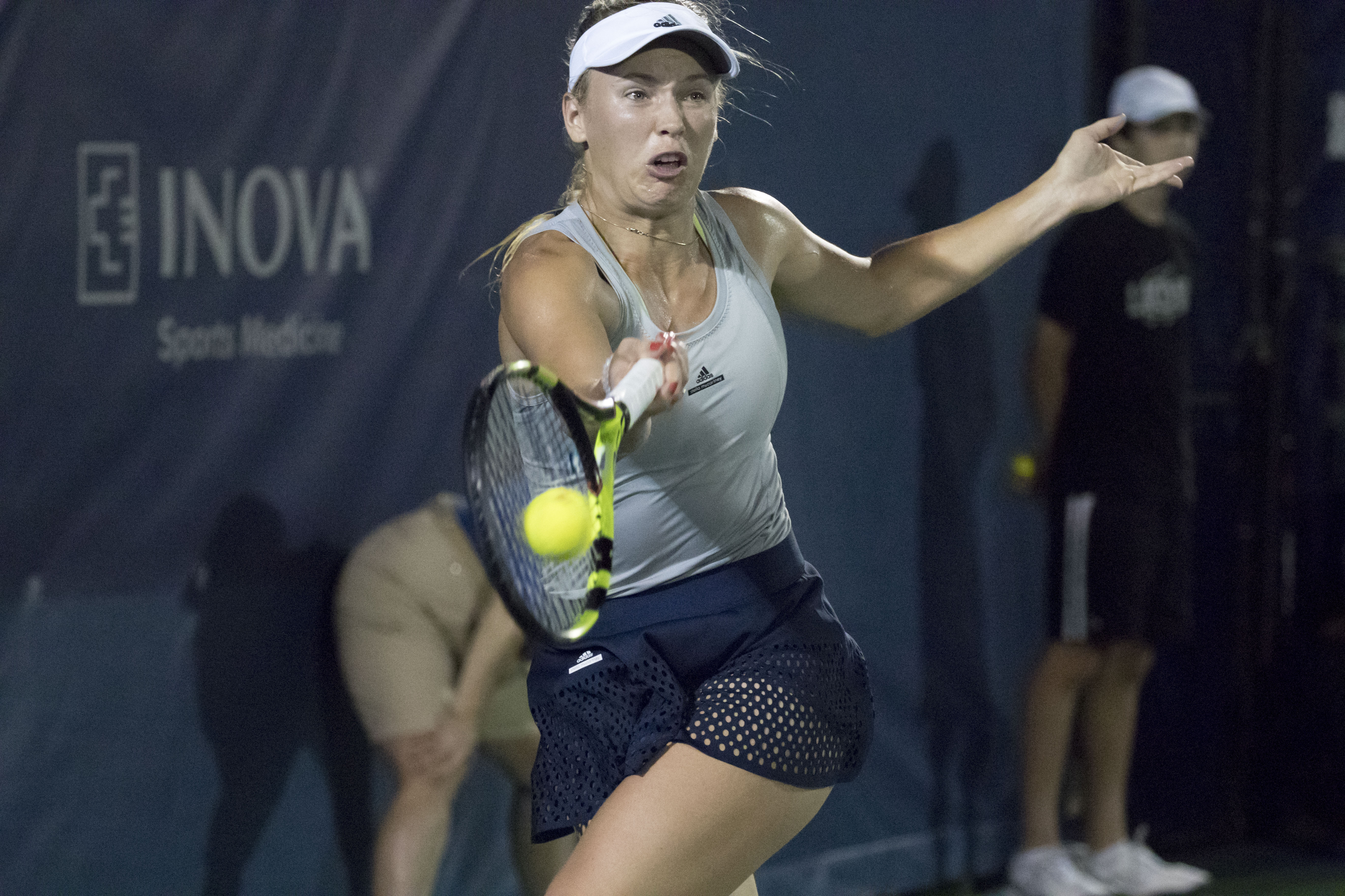 2016 Citi Open